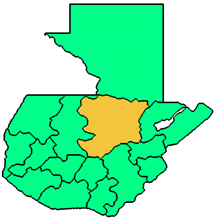 Mappa della diocesi cattolica di Verapaz, in Guatemala. Lavoro personale eseguito a partire da questa immagine di Commons. Fonte per i confini delle diocesi